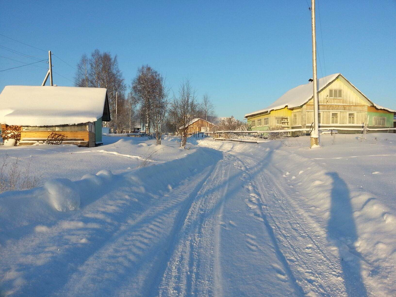 Морозное утро в деревне Засосенье